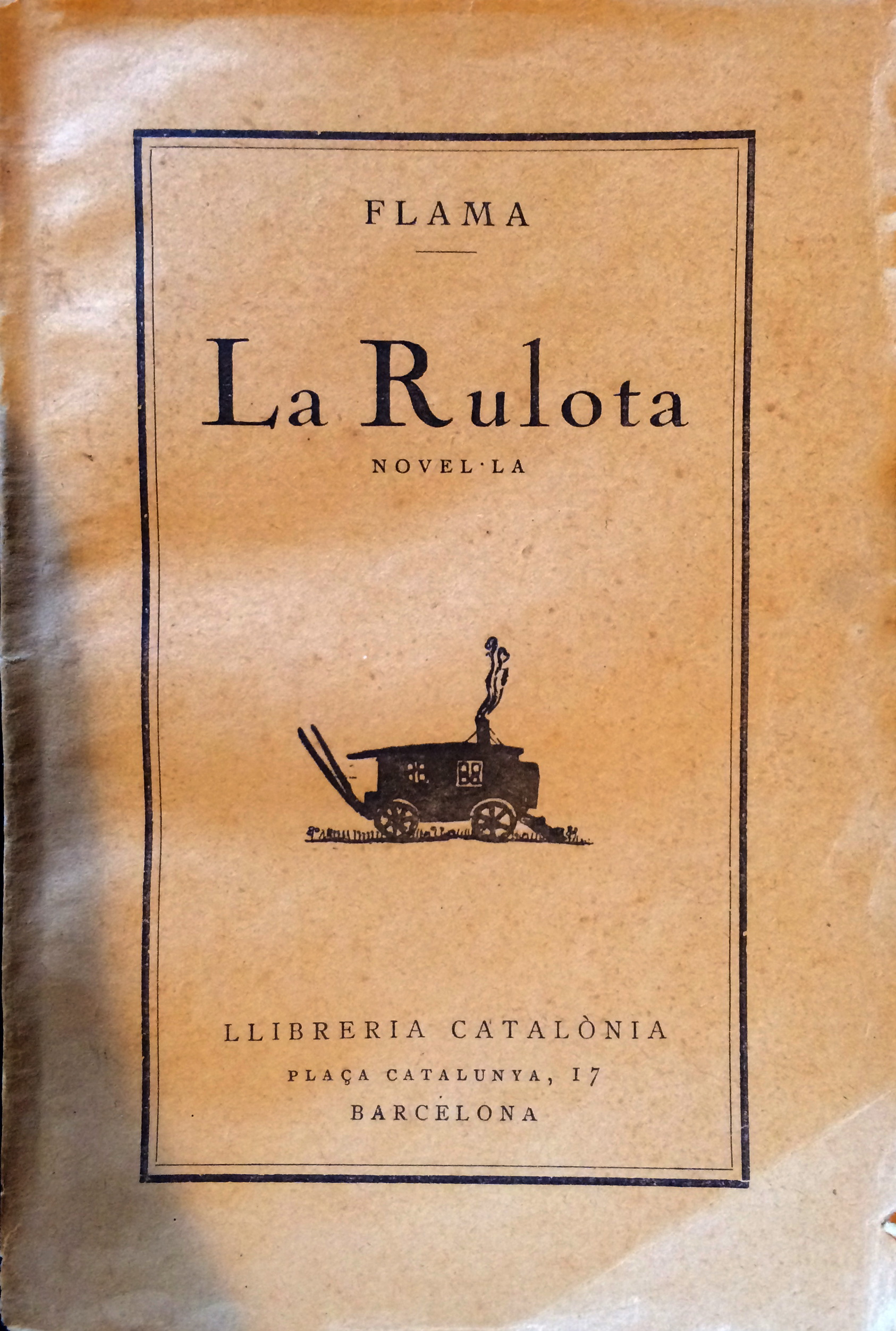 Portada de "La Rulota", la primera novel·la de Joaquim Folch i Torres